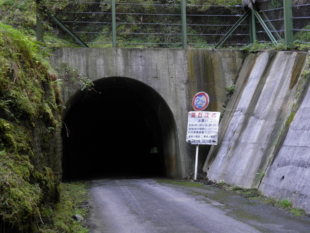 小南峠隧道・南側（奈良県吉野郡天川村）